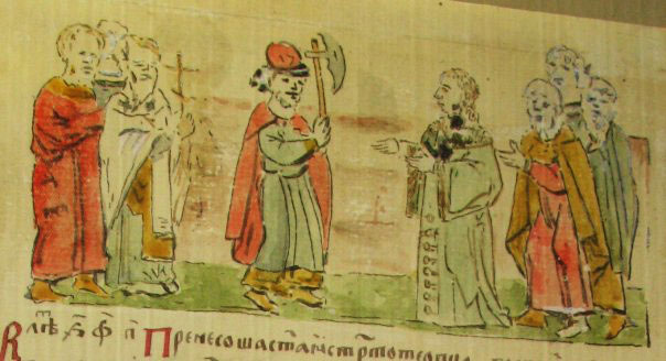 Князь Глеб убивает волхва. Новгород, 1071 год. Миниатюра Радзивиловской летописи.